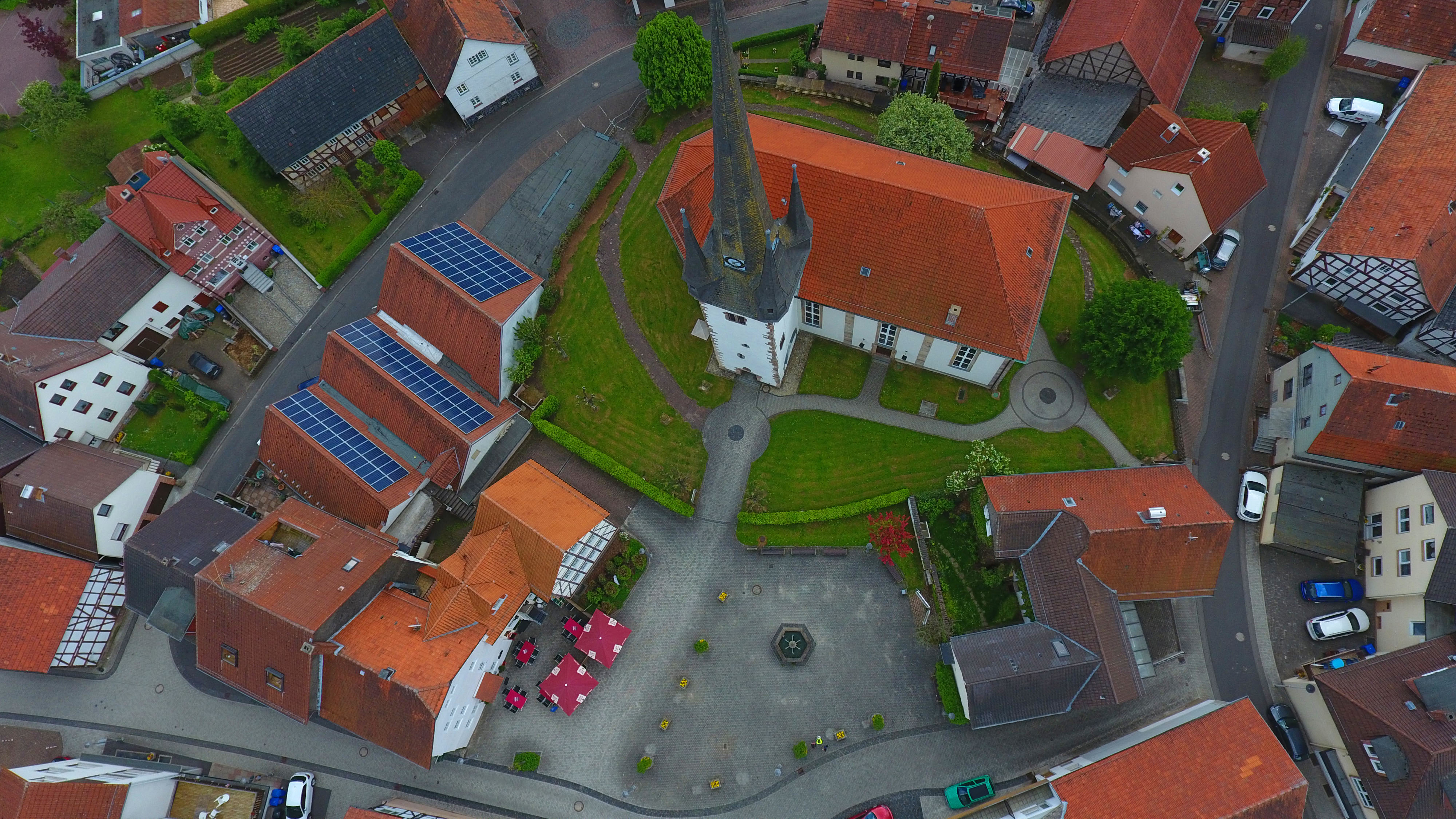 Luftaufnahme von